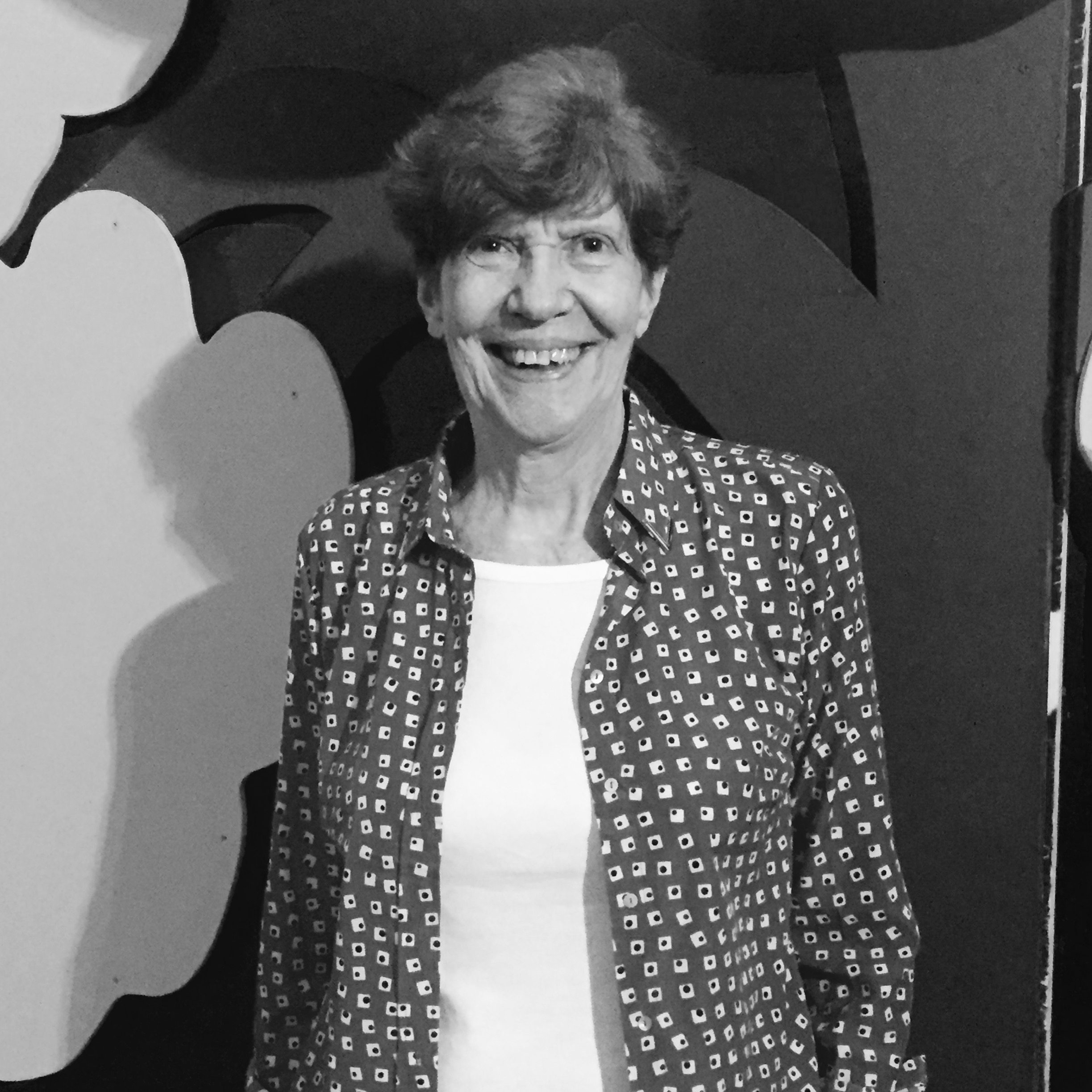 La escritora italiano-venezolana Victoria de Stefano.